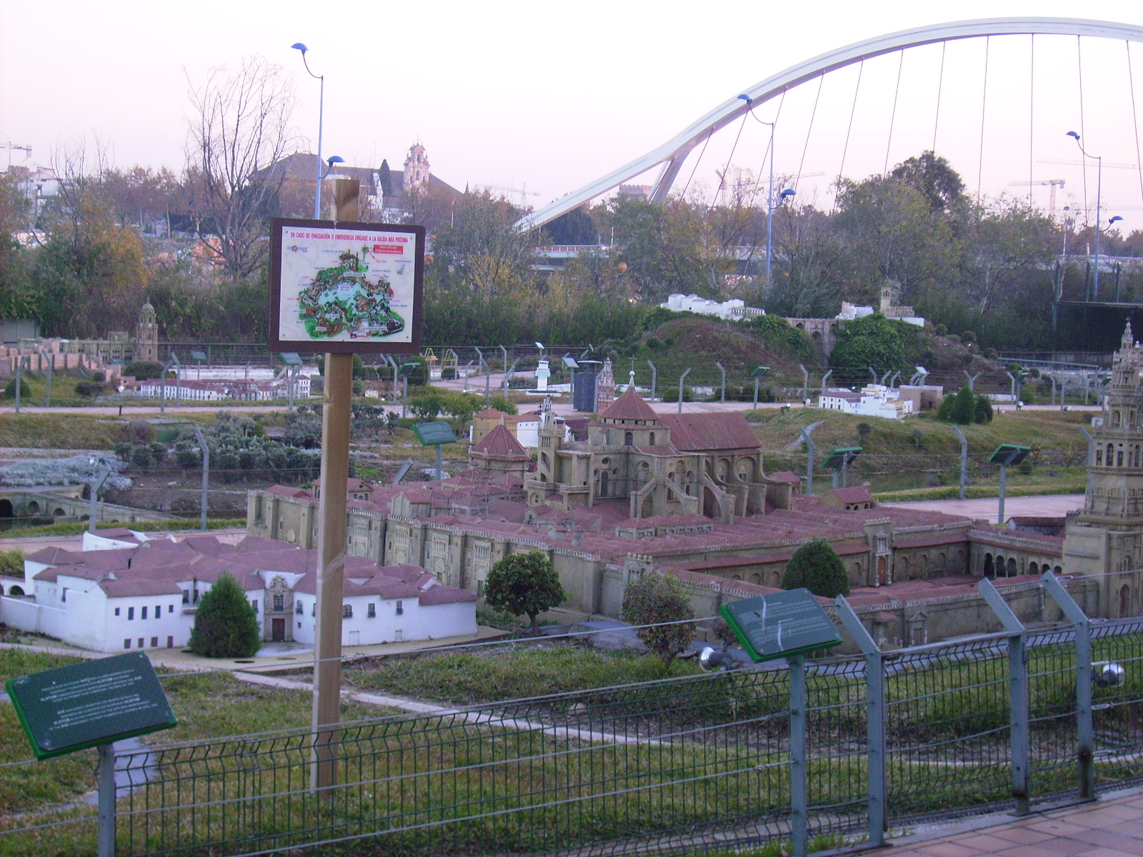 Sevilla. Expo 92. Reproducción de la maqueta a escala de la Mezquita de Córdoba incluida dentro de "El Balcón de Andalucía".